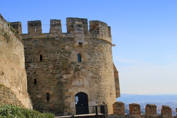 Τα τείχη της Άνω πόλης